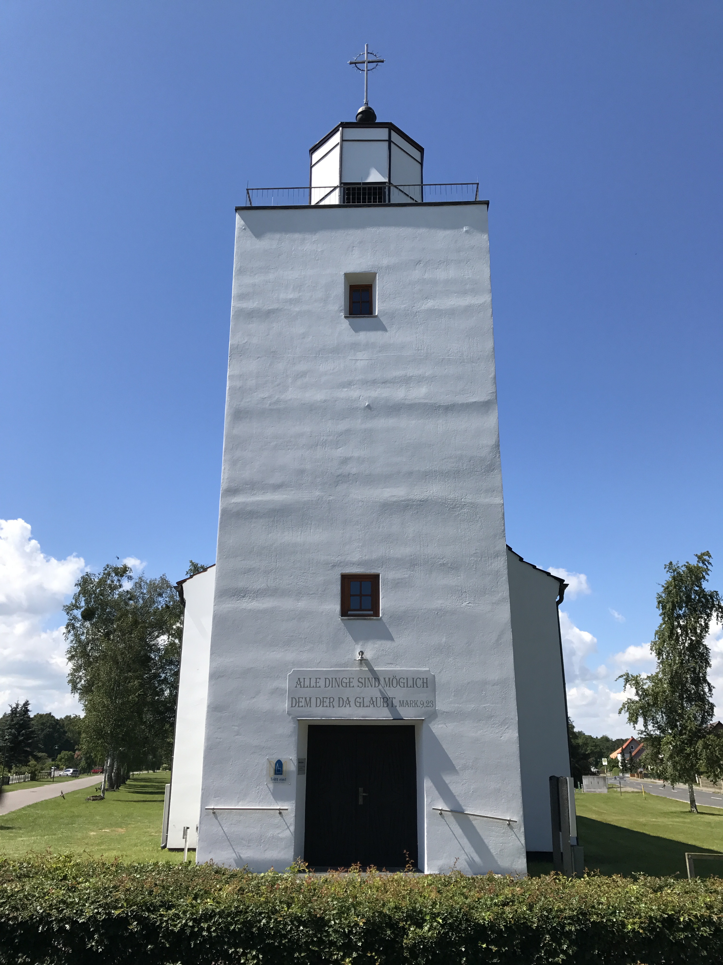 Die St. Petri-Kirche in Mönkebude ist eine Saalkirche aus den Jahren 1933 und 1934. In seinem Innern steht unter anderem ein kleines Altarkreuz, das H. Griese um 1960 bis 180 in Erfurt schuf.